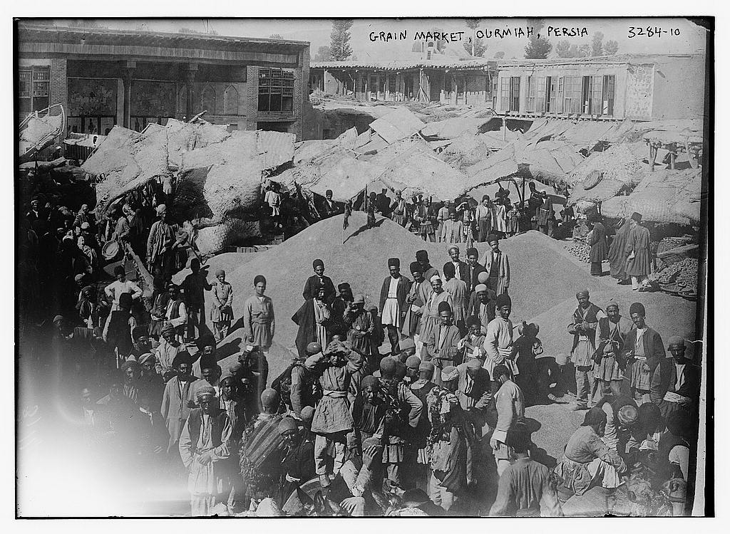 اورمیه احمد شاه